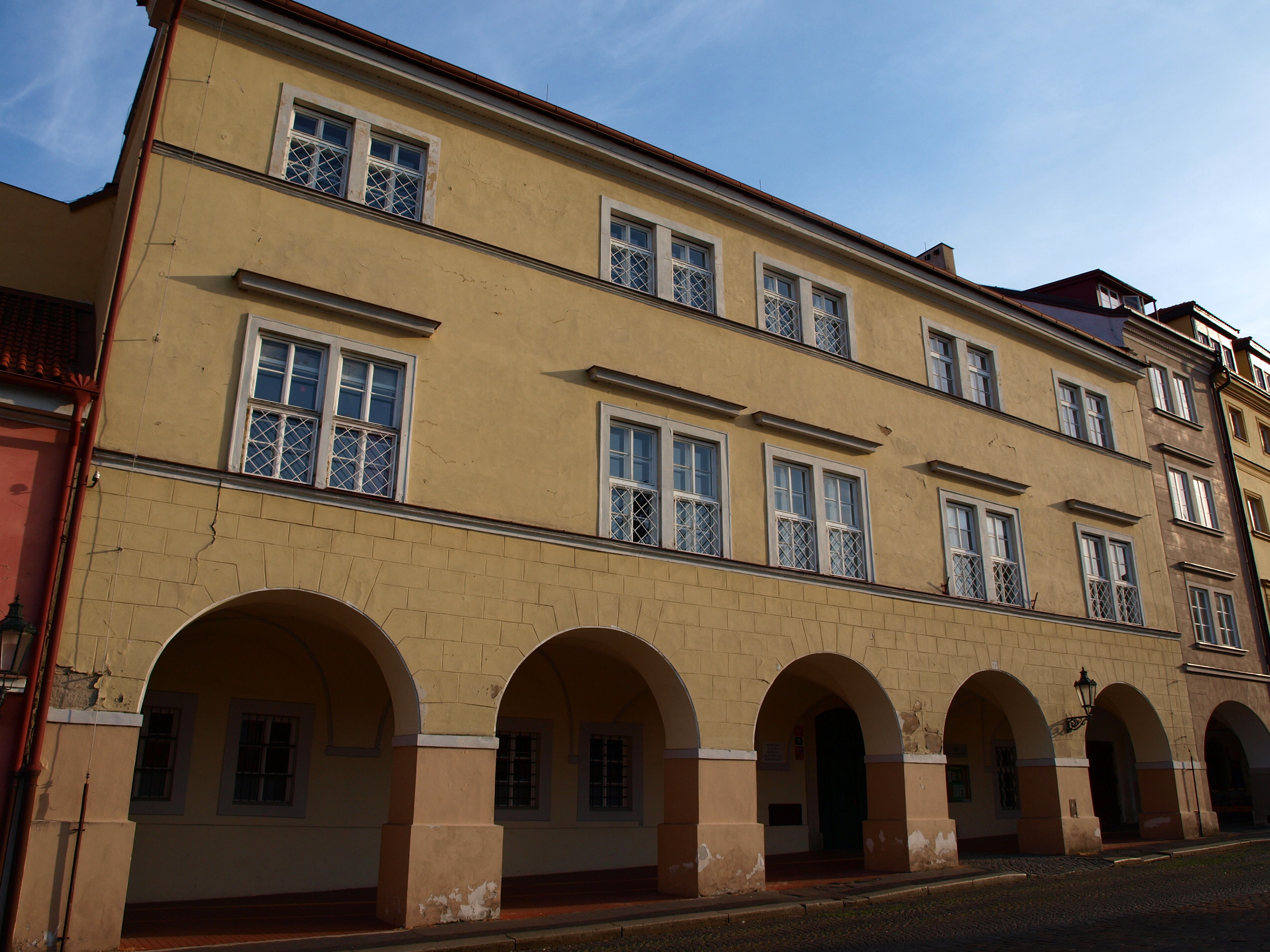 Vrbnovský palác, Hradčany